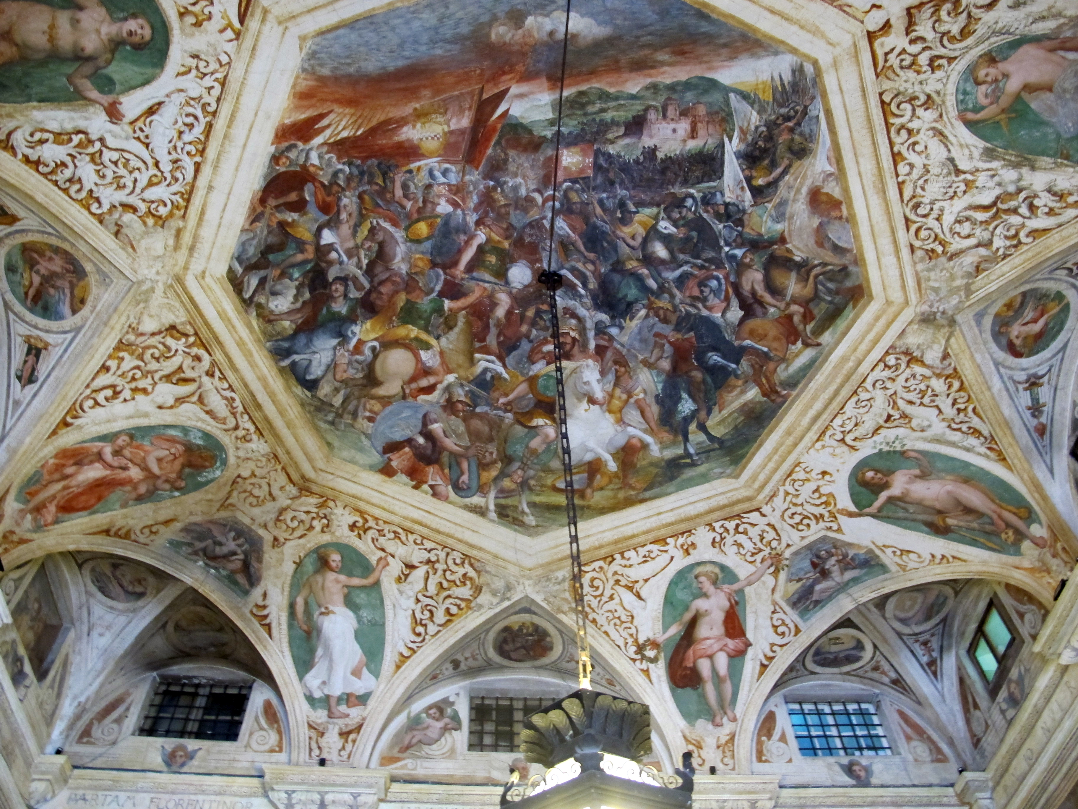 Genova, Liguria